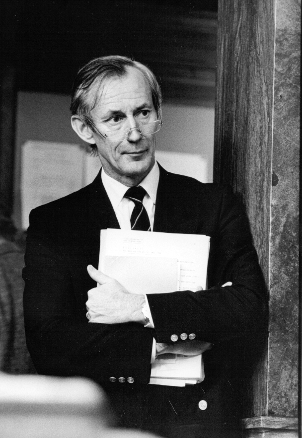 Gilbert Coutau, Schweizer Nationalrat und Ständerat (Kanton Genf, LPS)